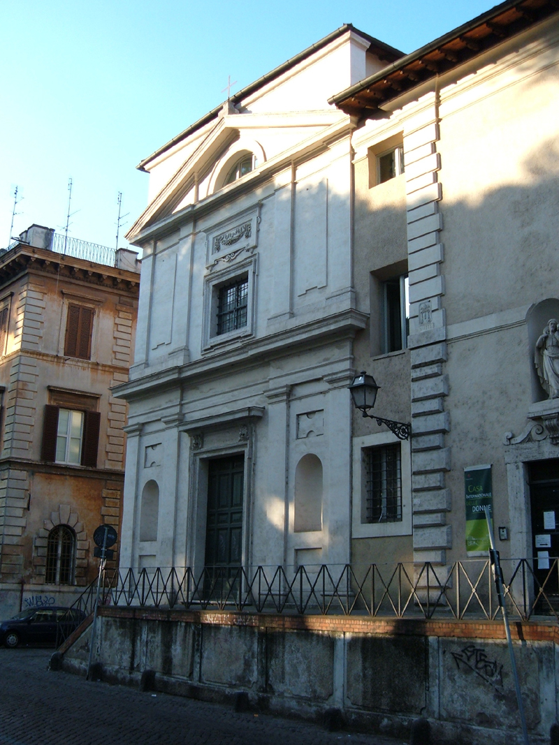 Eglise de Sainte Croix à la Lungara, à Rome, dans le "rione Trastevere".